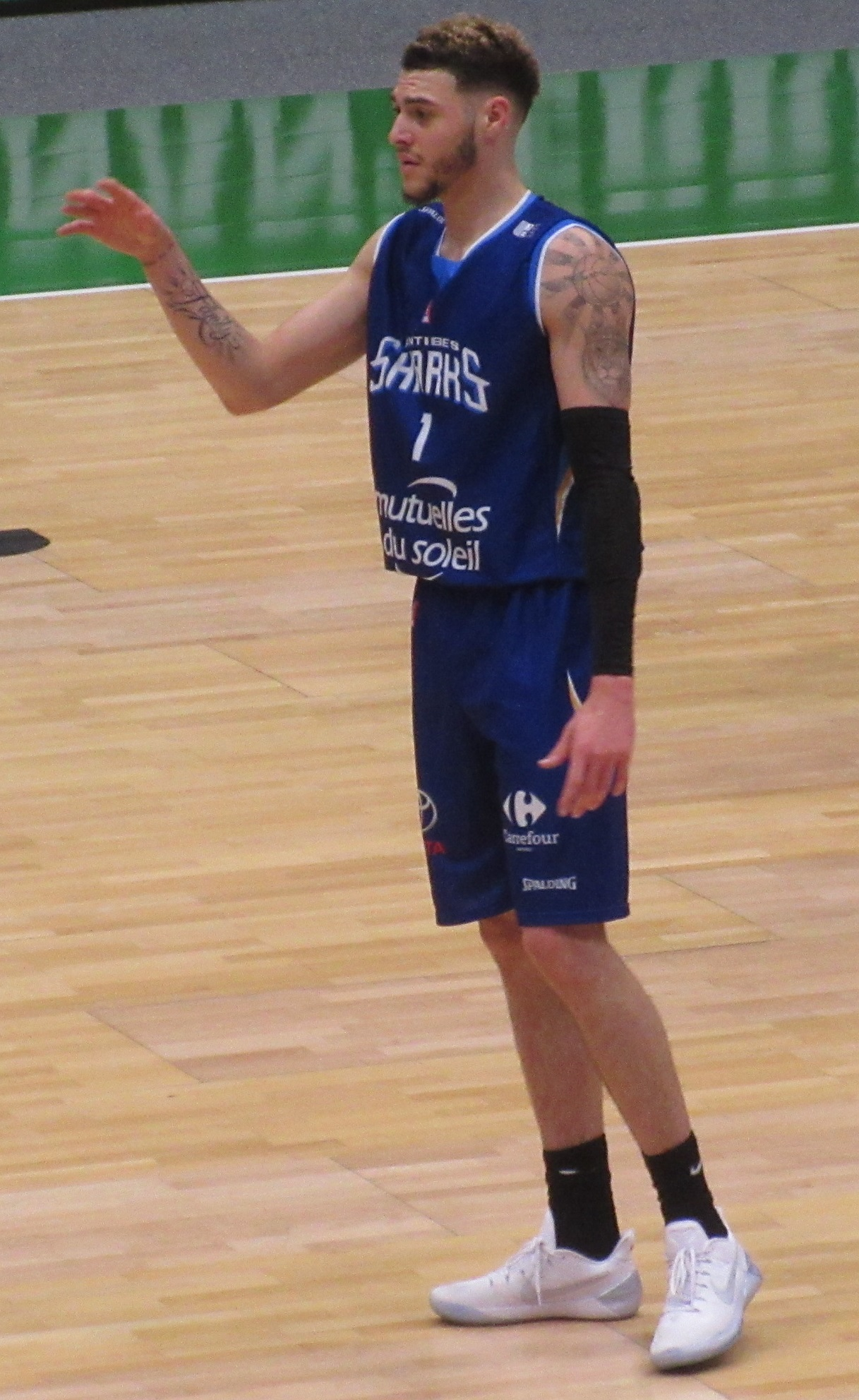 Isaia Cordinier avec le maillot d'Antibes